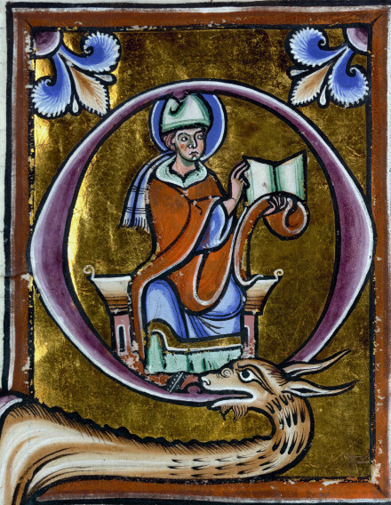 Gilbert de la Porrée tenant un livre.